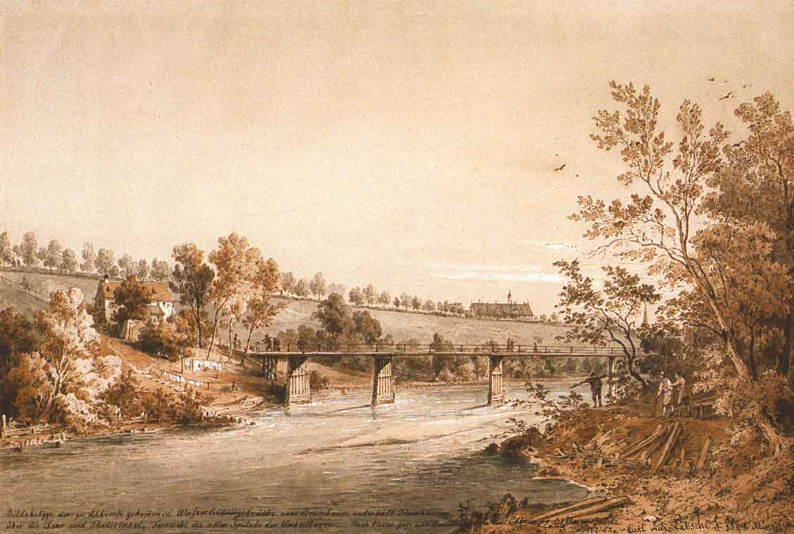 Bildskitzze der zu Abbruch gekommenen Wasserleitungsbrücke vom Brunhaus unterhalb Haidhausen über die Isar und Praterinsel, Fernsicht des alten Spitals der Unheilbaren. Nach Natur gez: vor dem Abbruch und Erbauung der Neuen Brücke